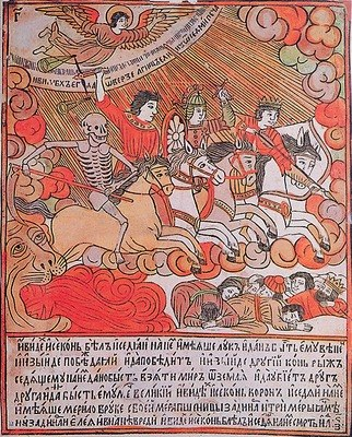 "БИБЛИЯ ДЛЯ БЕДНЫХ" (1692-1696 гг.) ВАСИЛИЯ КОРЕНЯ.